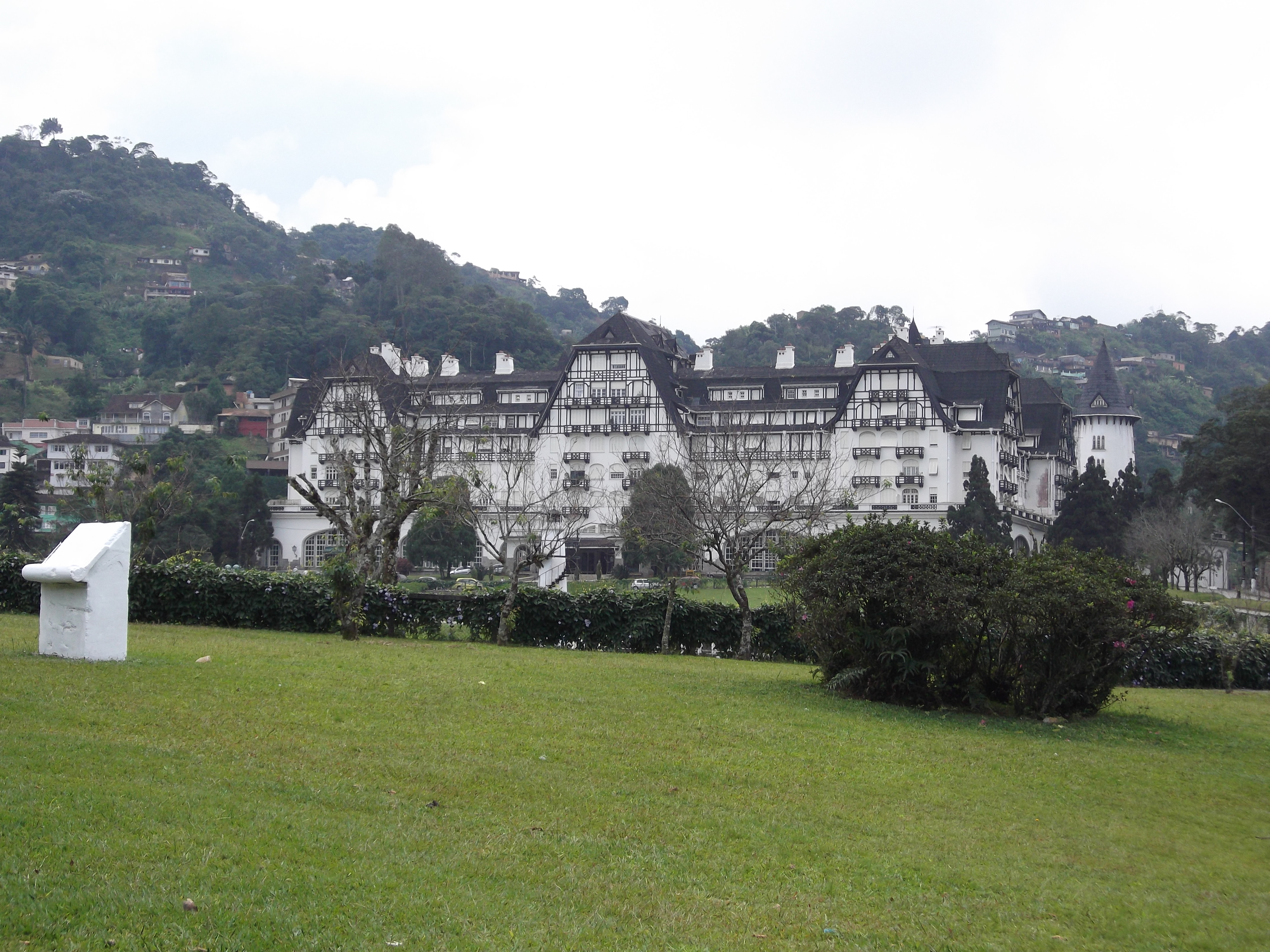 Palácio Quitandinha, Petrópolis, Rio de Janeiro, Brasil.